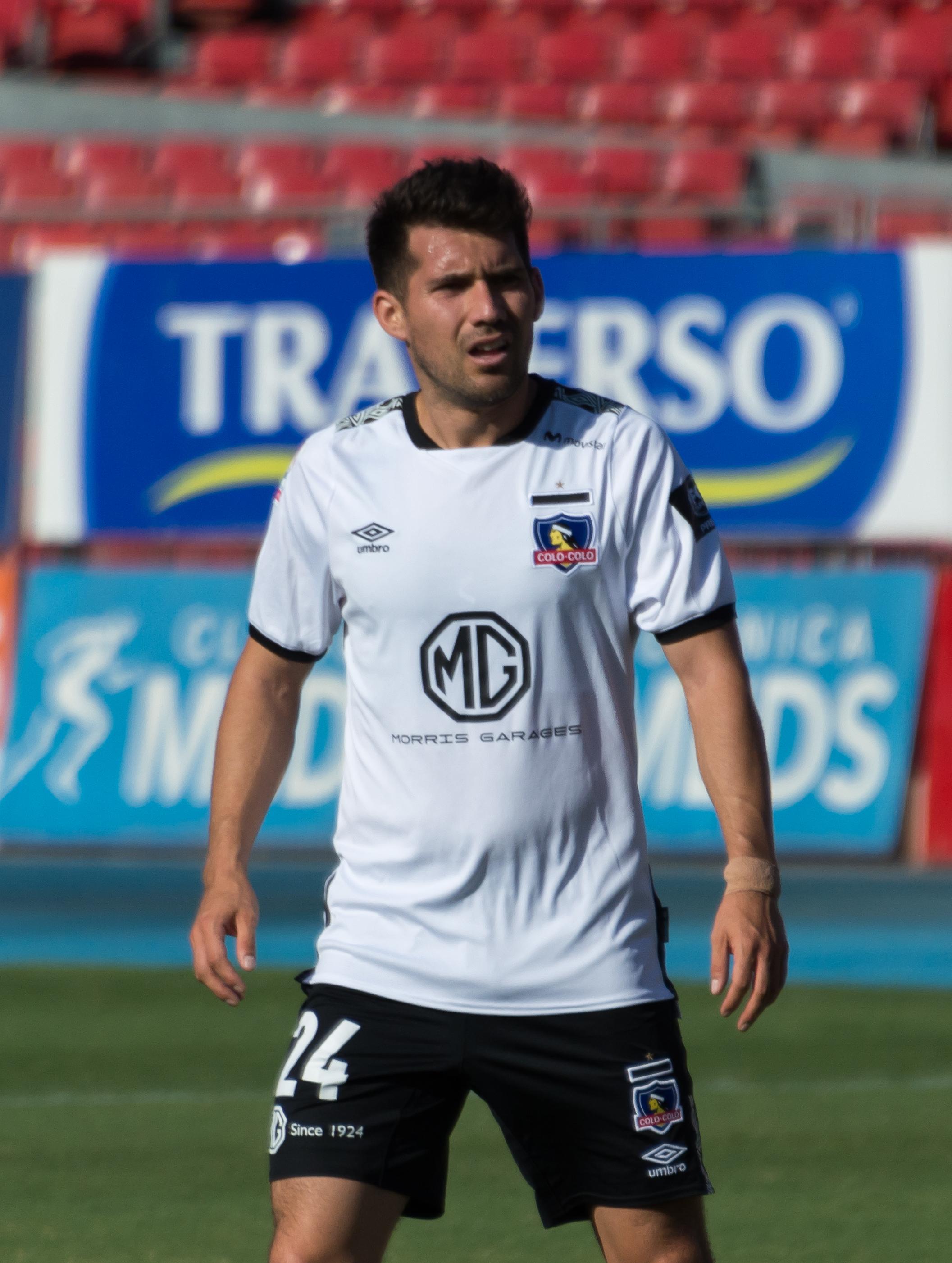 Audax Italiano v Colo-Colo, Estadio Nacional, Ñuñoa, Santiago, Región Metropolitana, Chile